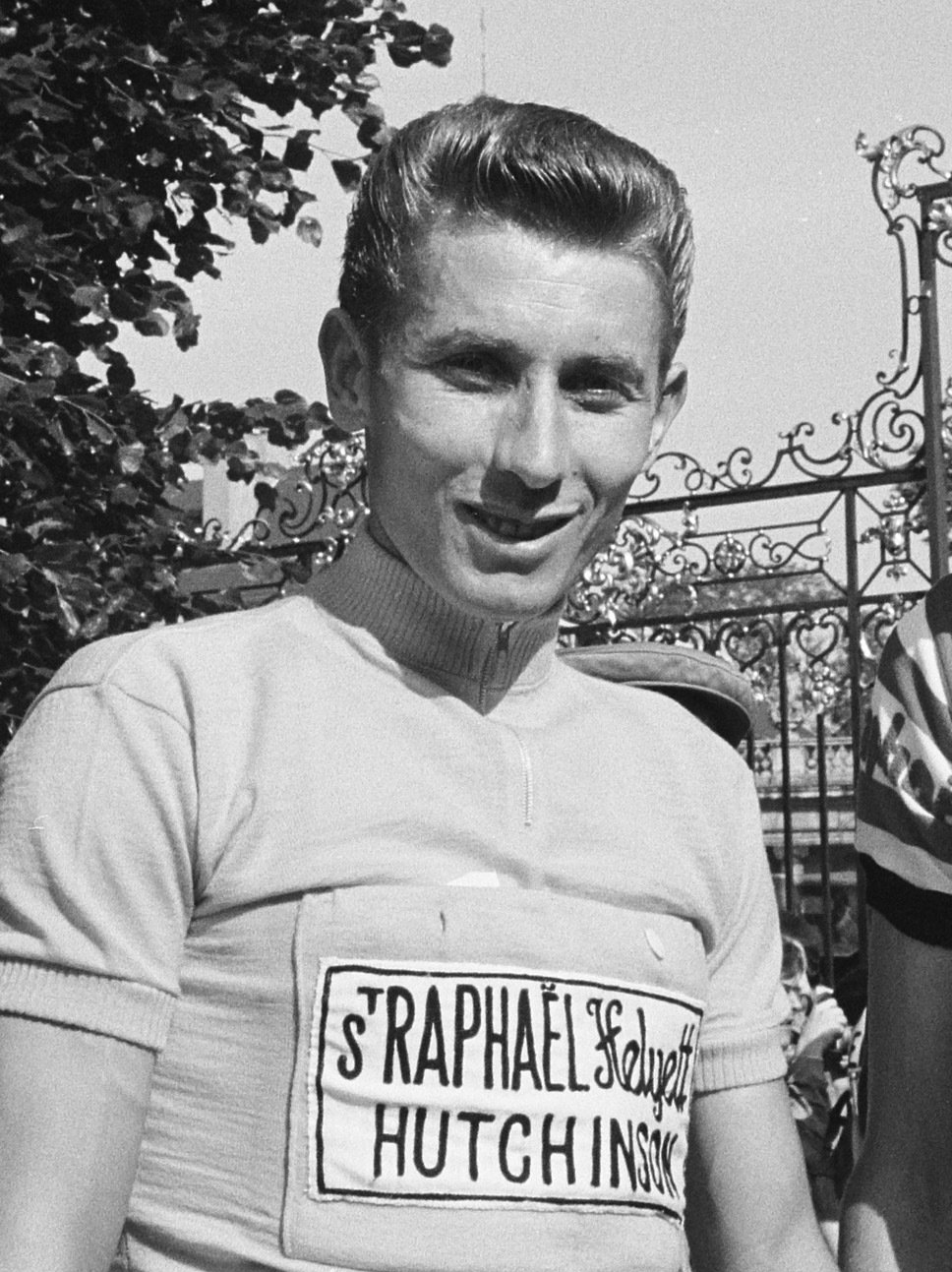 Tour de France 1962 , Ab Geldermans, Jacques Anquetil, [Mies Stolker?].